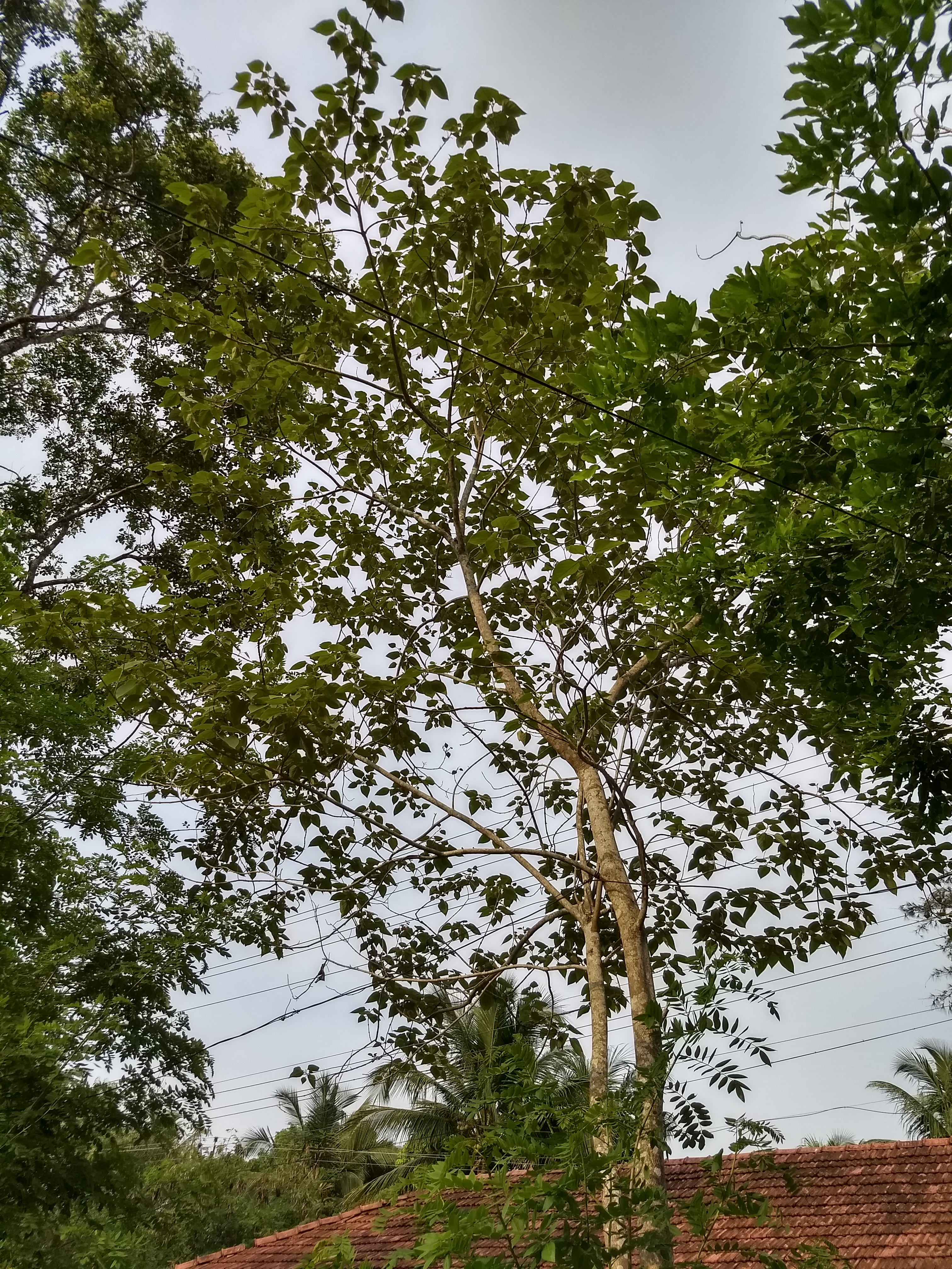 Gmelina arborea - Gamhar. From Thuravoor